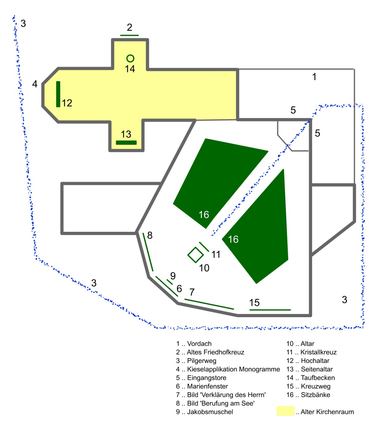 Pfarrkirche St.Jakob in Thal bei Graz Grundriss